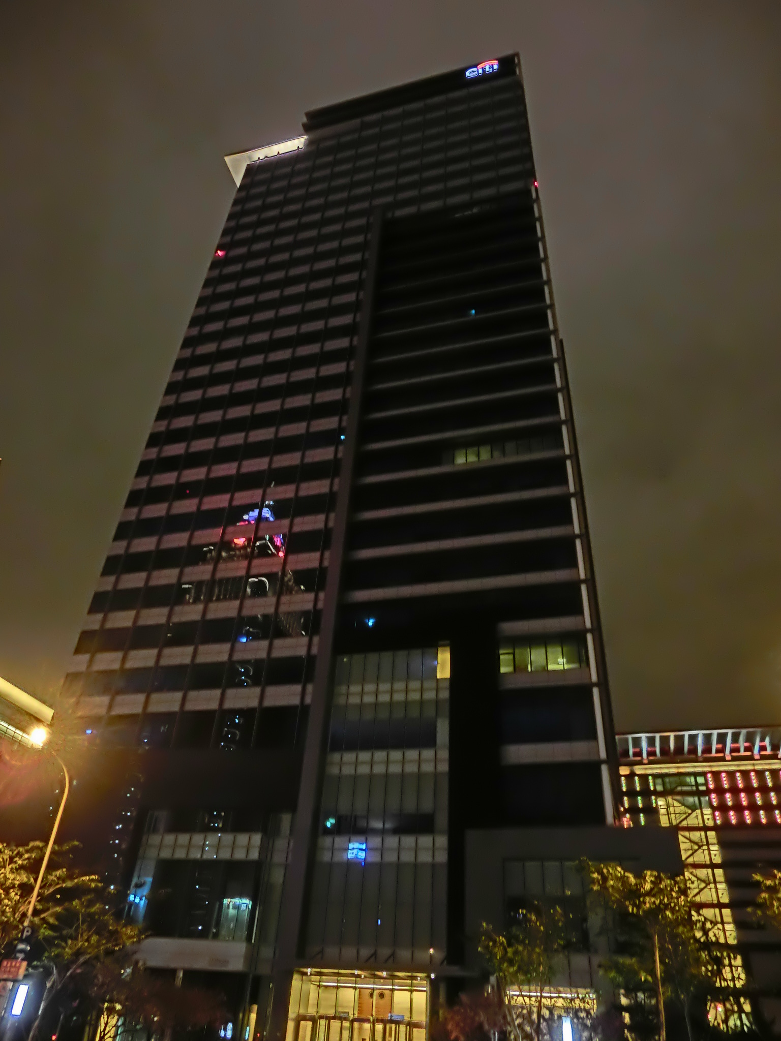 中文（台灣）: 華新麗華大樓夜景。